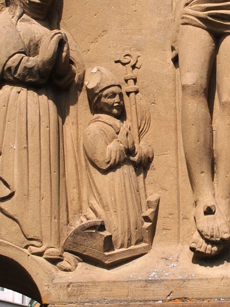 Detail des Kreuzigungsbildstock vor dem Kloster Münsterschwarzach, Abt Martin kniend